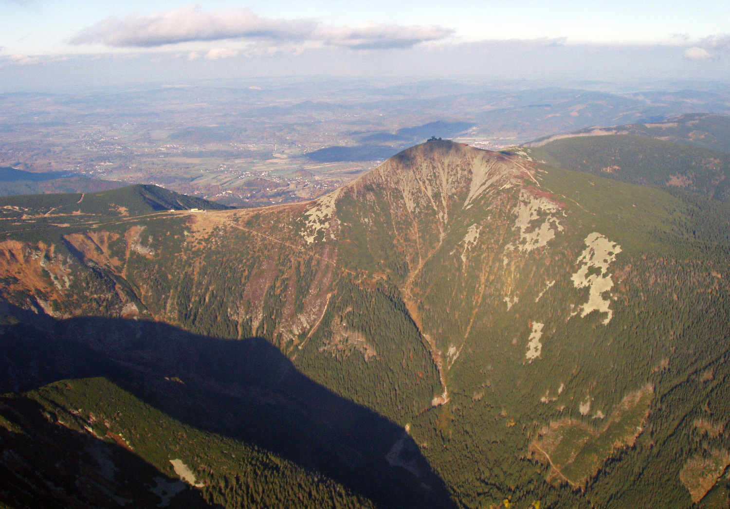 Sněžka a Obří důl